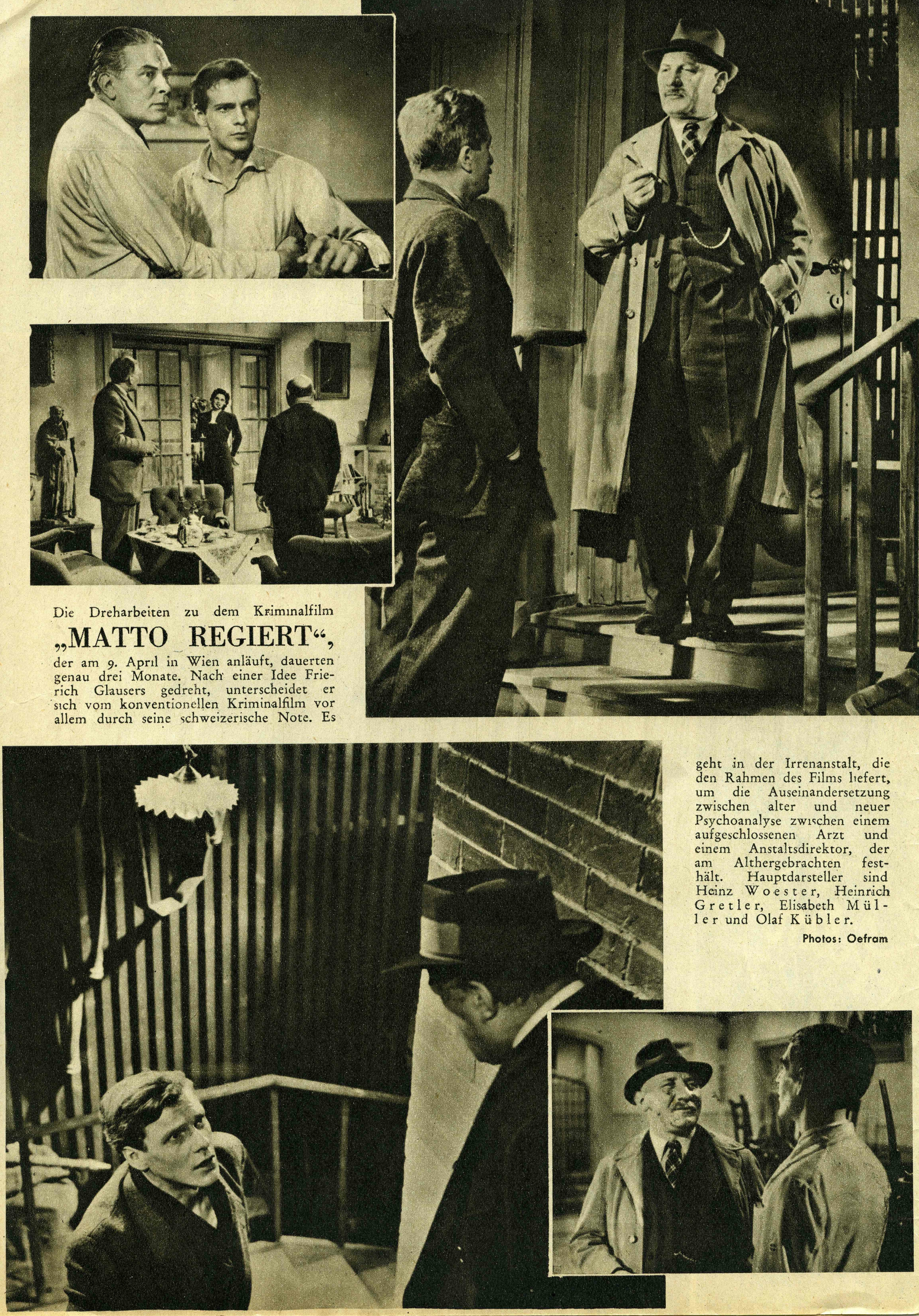 Bildbericht über "Matto regiert" in der Zeitschrift "Mein Film - Illustrierte Film- und Kinorundschau". Nr. 14 / 2. April 1948